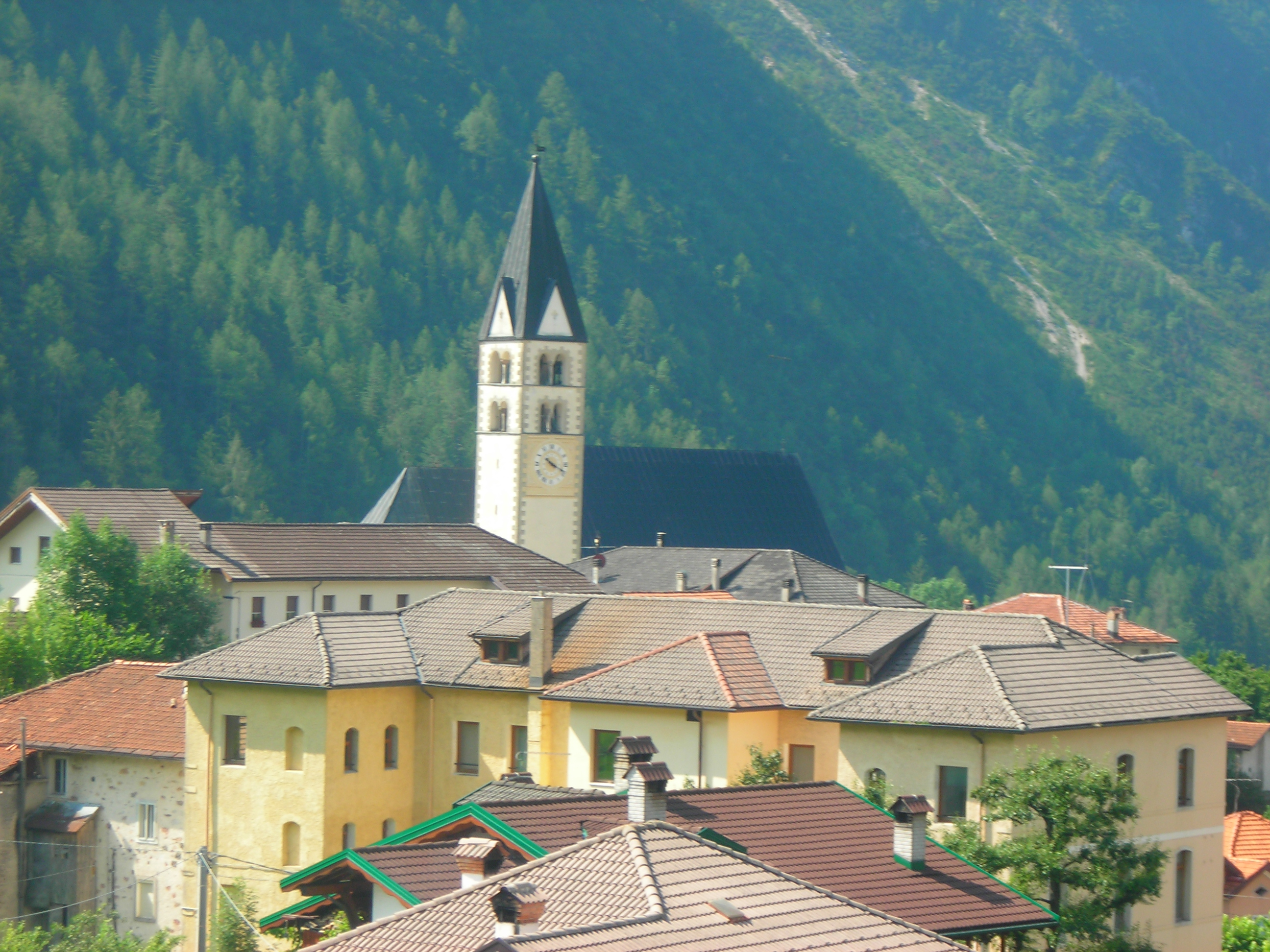 Vista del centro di La Valle dalle rive sopra il Missiaga.